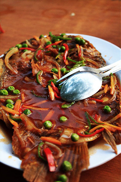 Gurame asam pedas